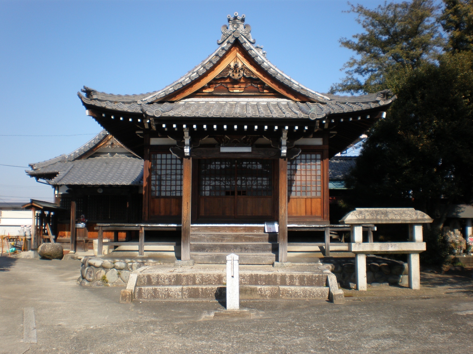 愛知県小牧市小牧にある玉林寺本堂